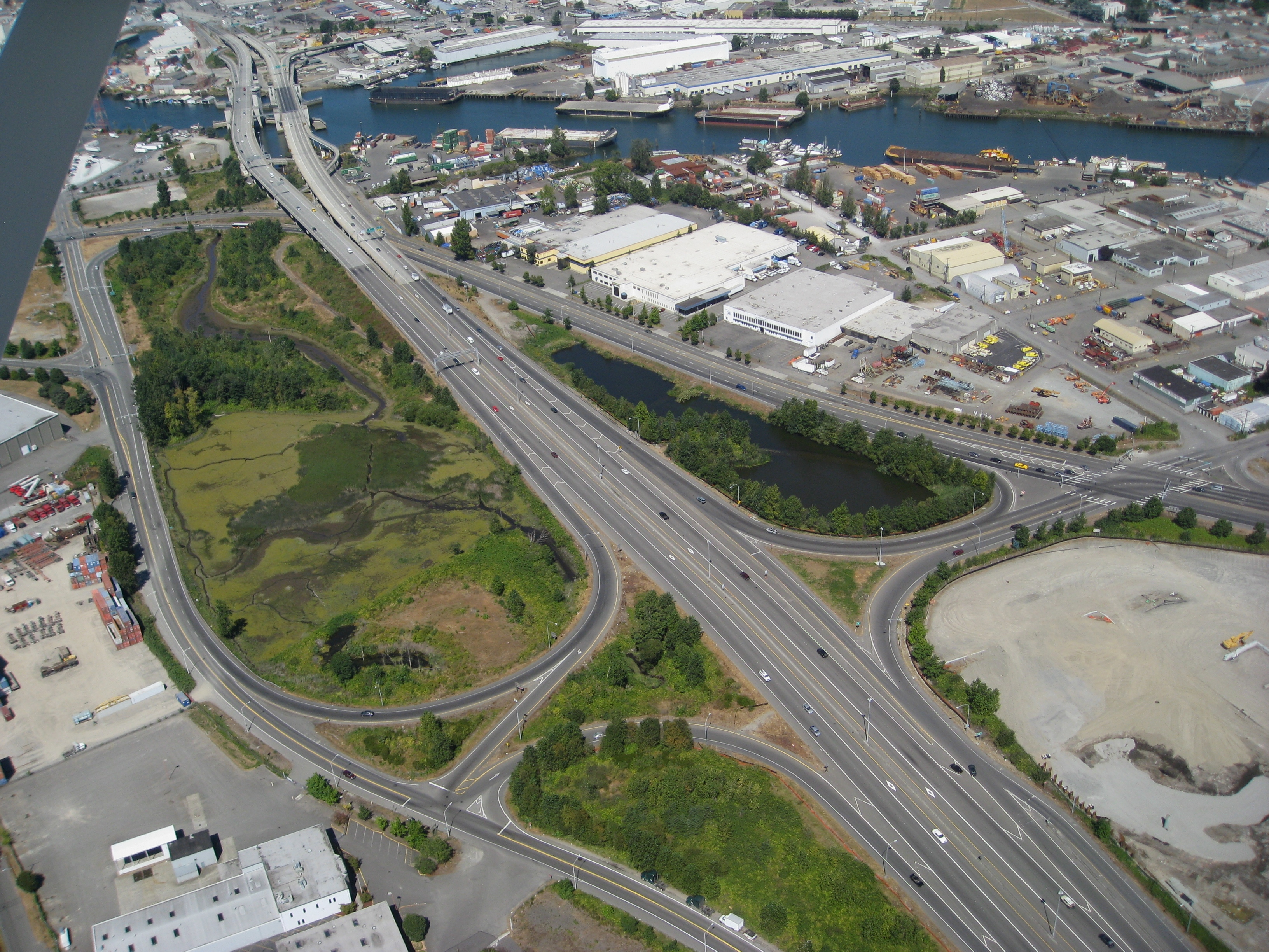 West Seattle